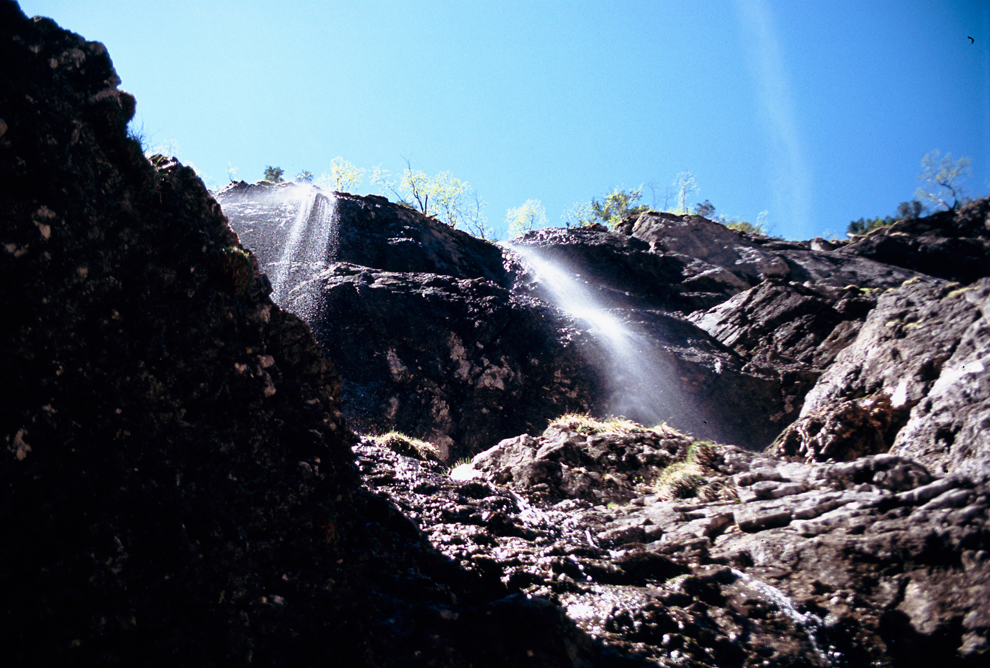 In der Höllentalklamm (Wettersteingebirge)